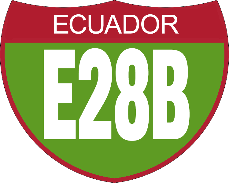 Disco de Identificación Ruta E28B